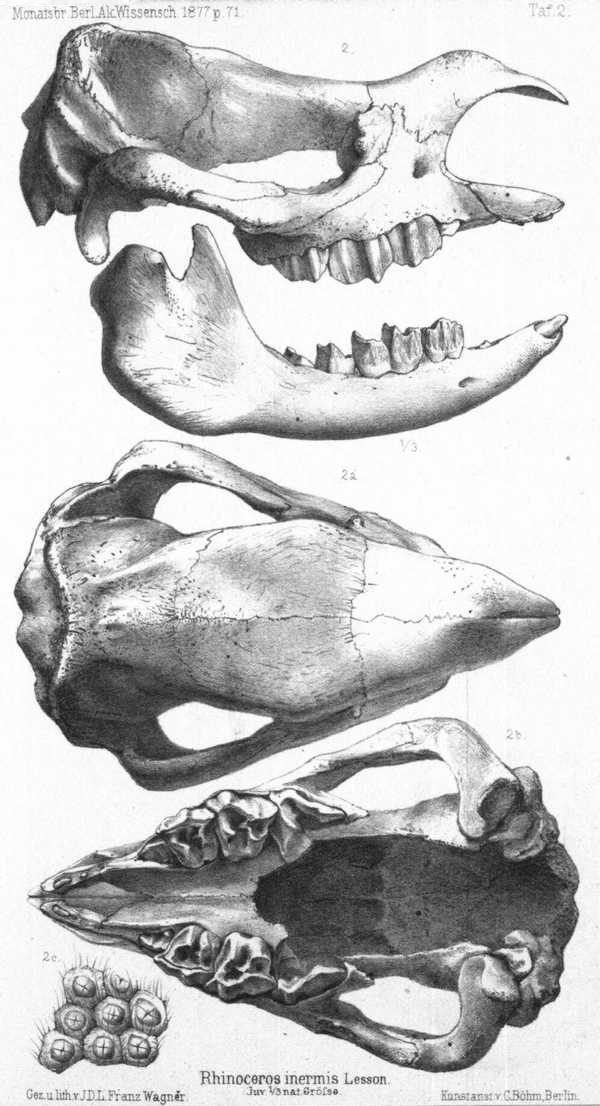 Skull of a Javan rhino in the Berlin Museum, the type of Rhinoceros inermis. From Peters, W., 1877. Ueber Rhinoceros inermis Lesson. Monatsberichte der Koniglichen Preussischen Akademie der Wissenschaften zu Berlin 1877: 68-71, pl. 2